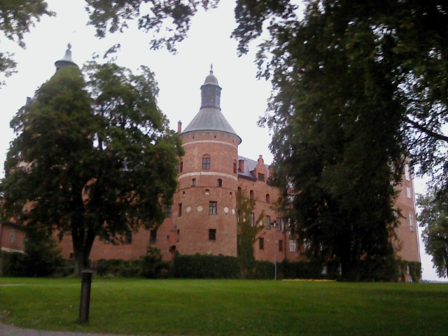 Gripsholms slott Fängelsetornet